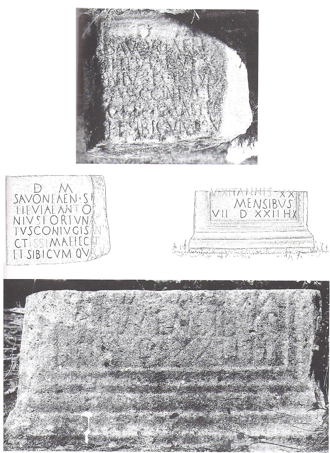 Ara funeraria di Gravina ed epitaffio, con relativa ricostruzione.